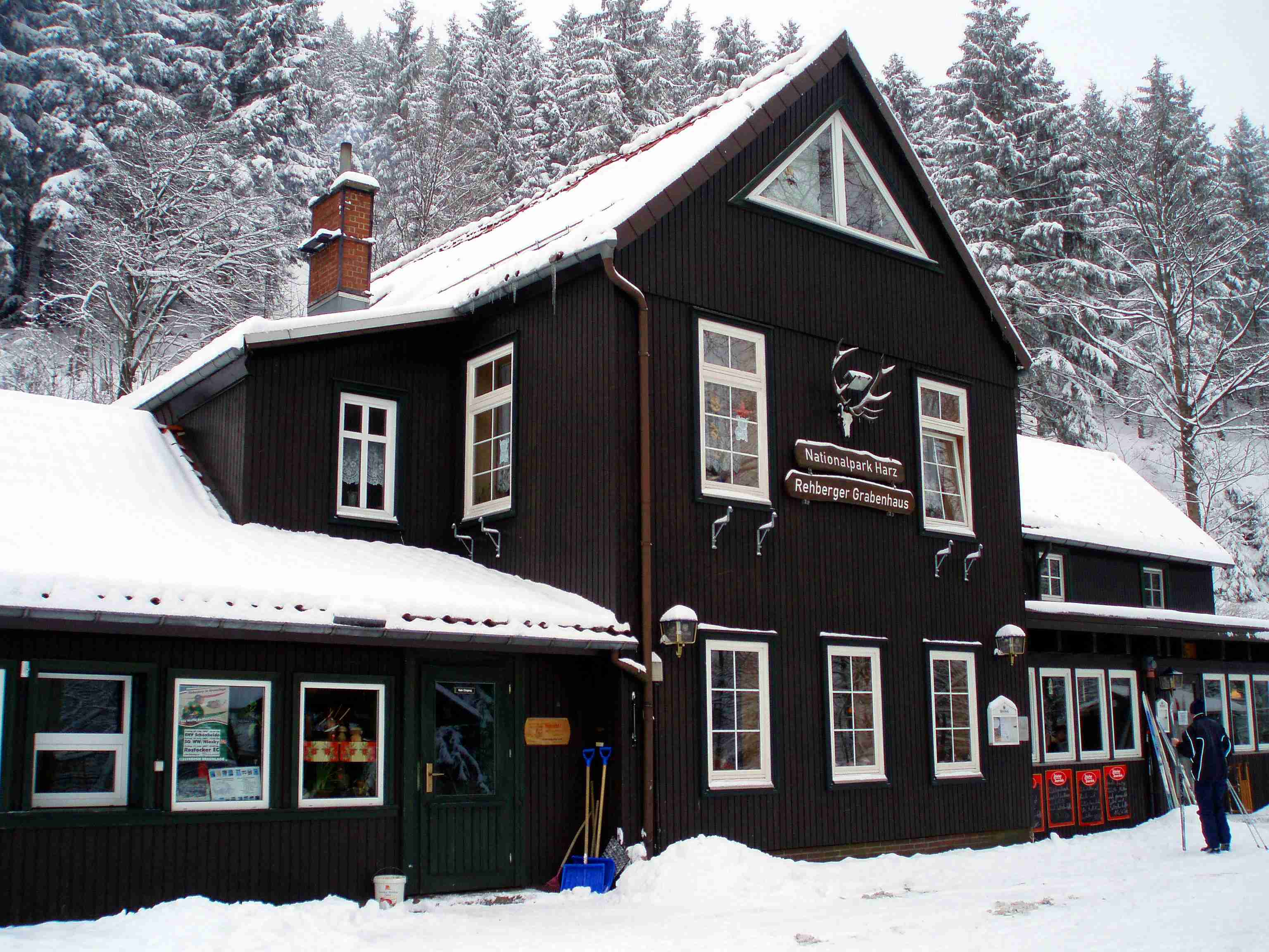 Rehberger Grabenhaus im Winter